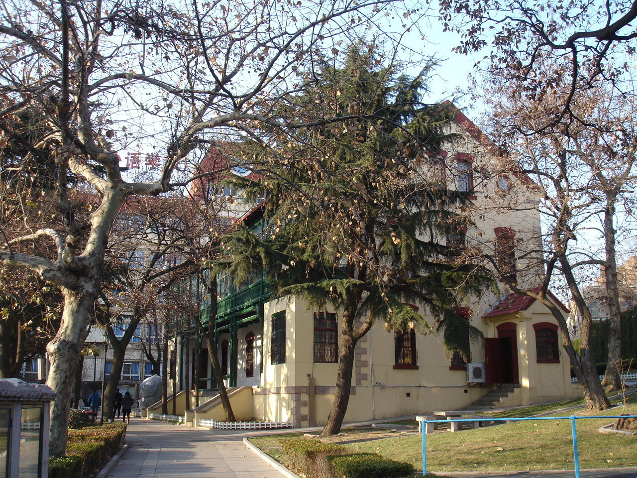 青岛九中礼贤楼，卫礼贤故居 Ehemaliger Wohnsitz von Richard Wilhelm